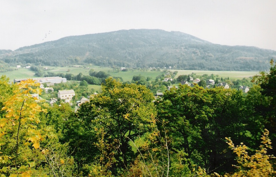 Kozákov, 744 m, nejvyšší vrch Českého ráje autor: František Mlejnek, asi roku 2000